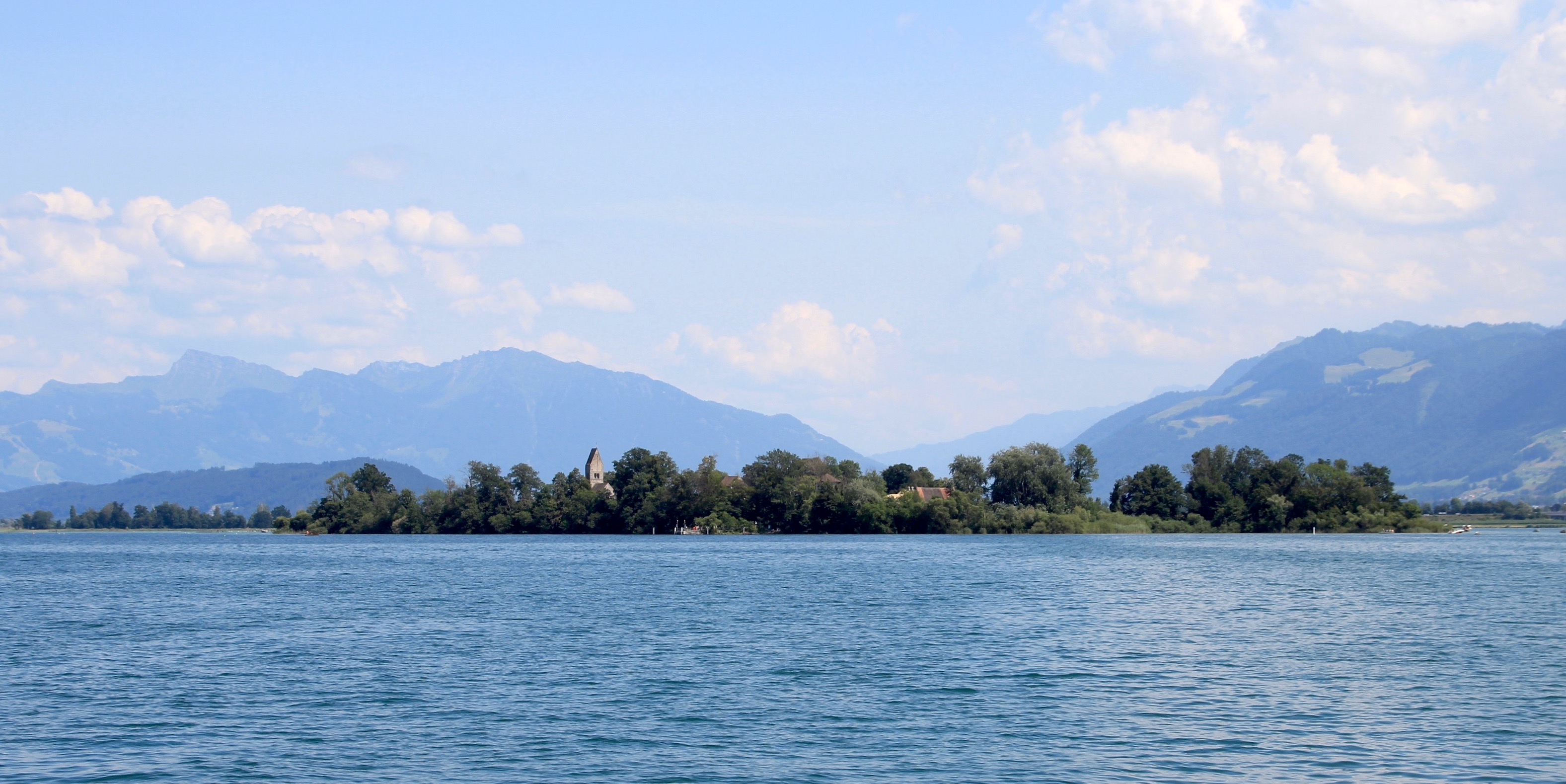 Ufenau von NW